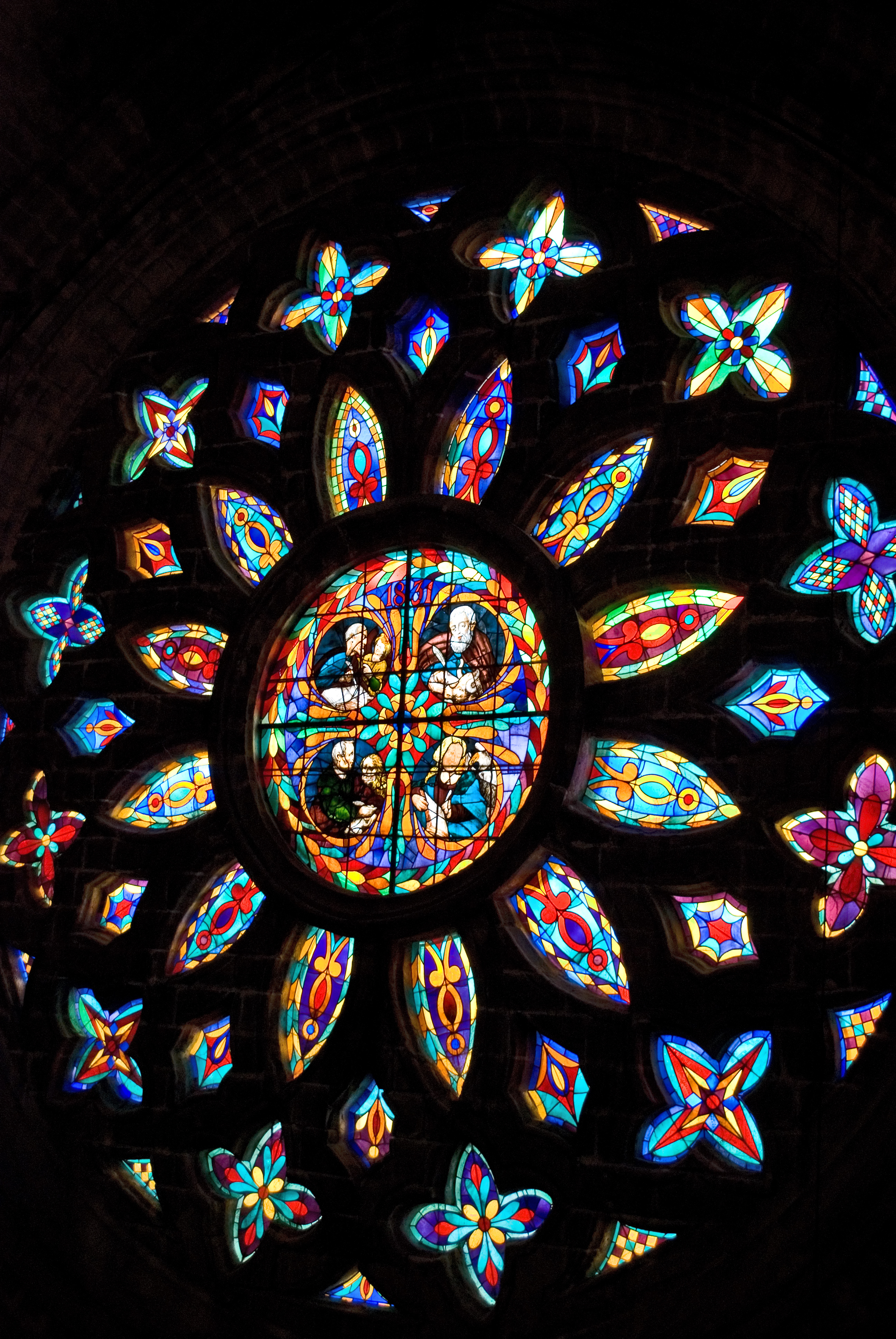 Rosetón correspondiente a la puerta de la Asunción de la Catedral de Sevilla.